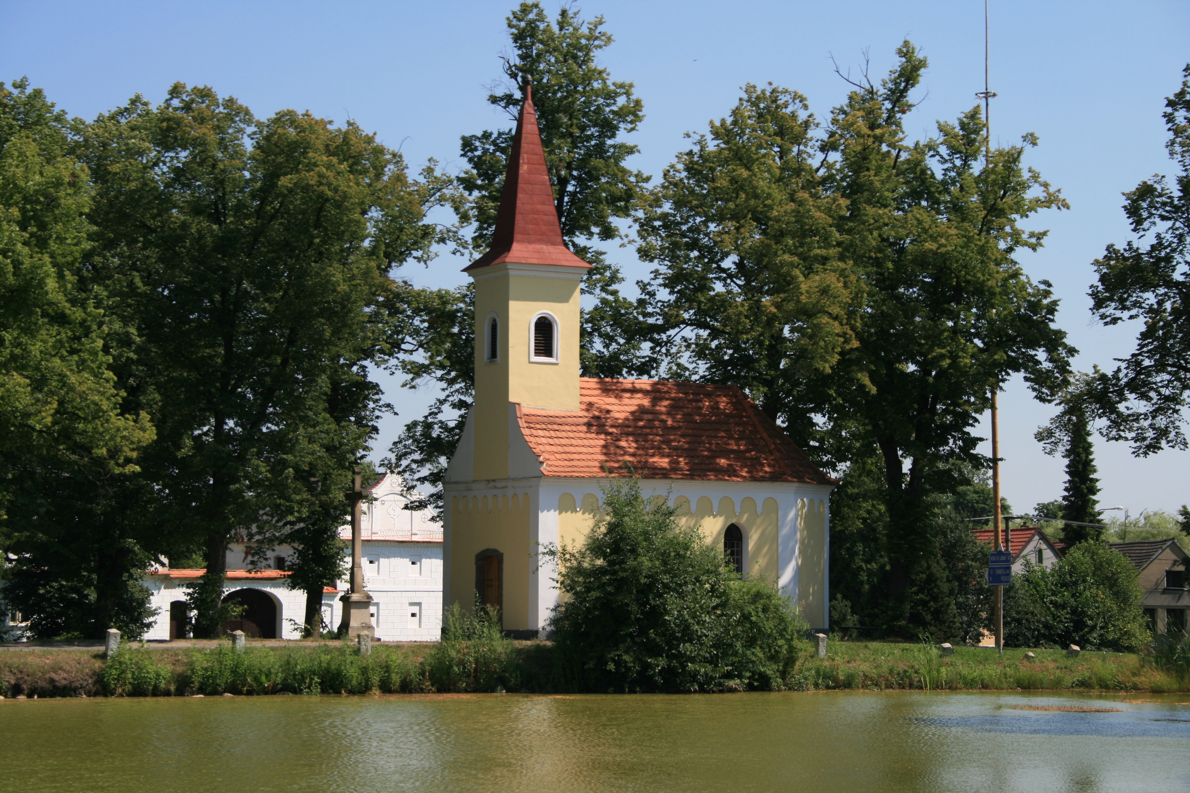 Mažice - Kostelík